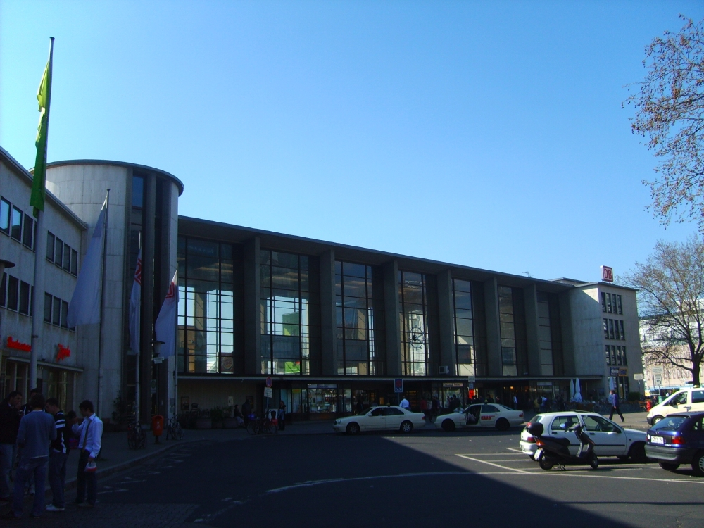 Heidelberg Hauptbahnhof, Ostfassade